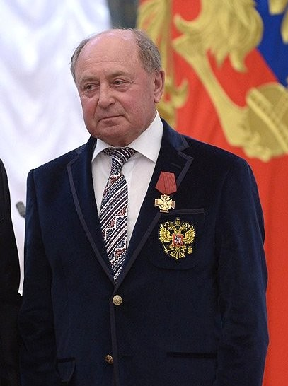 Вручение государственных наград Российской Федерации. Тренер спортивной сборной команды Российской Федерации по фигурному катанию на коньках федерального государственного бюджетного учреждения «Центр спортивной подготовки сборных команд России» Алексей Мишин награждён орденом «За заслуги перед Отечеством» IV cтепени.